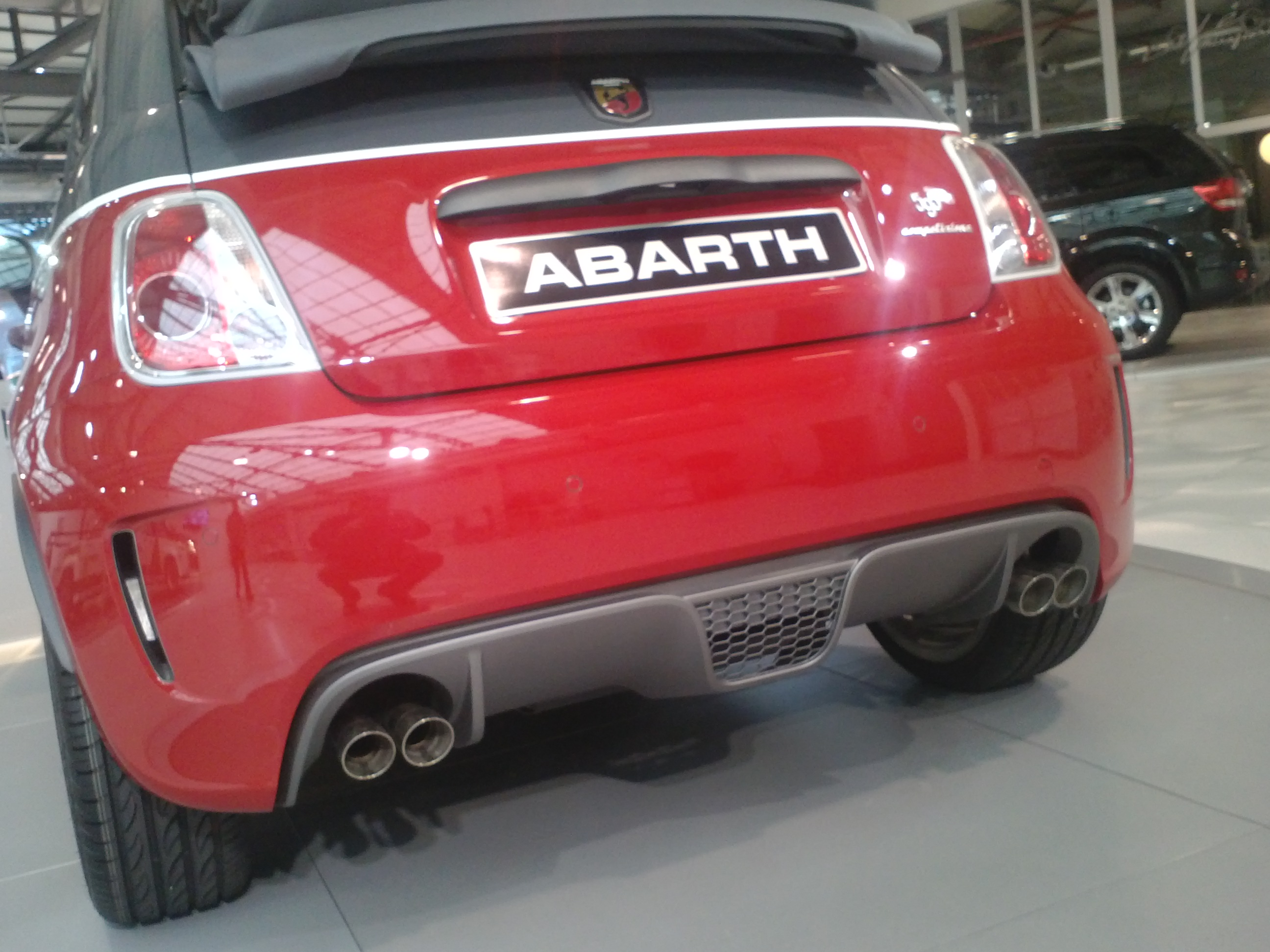 Abarth_595_50°_Anniversario